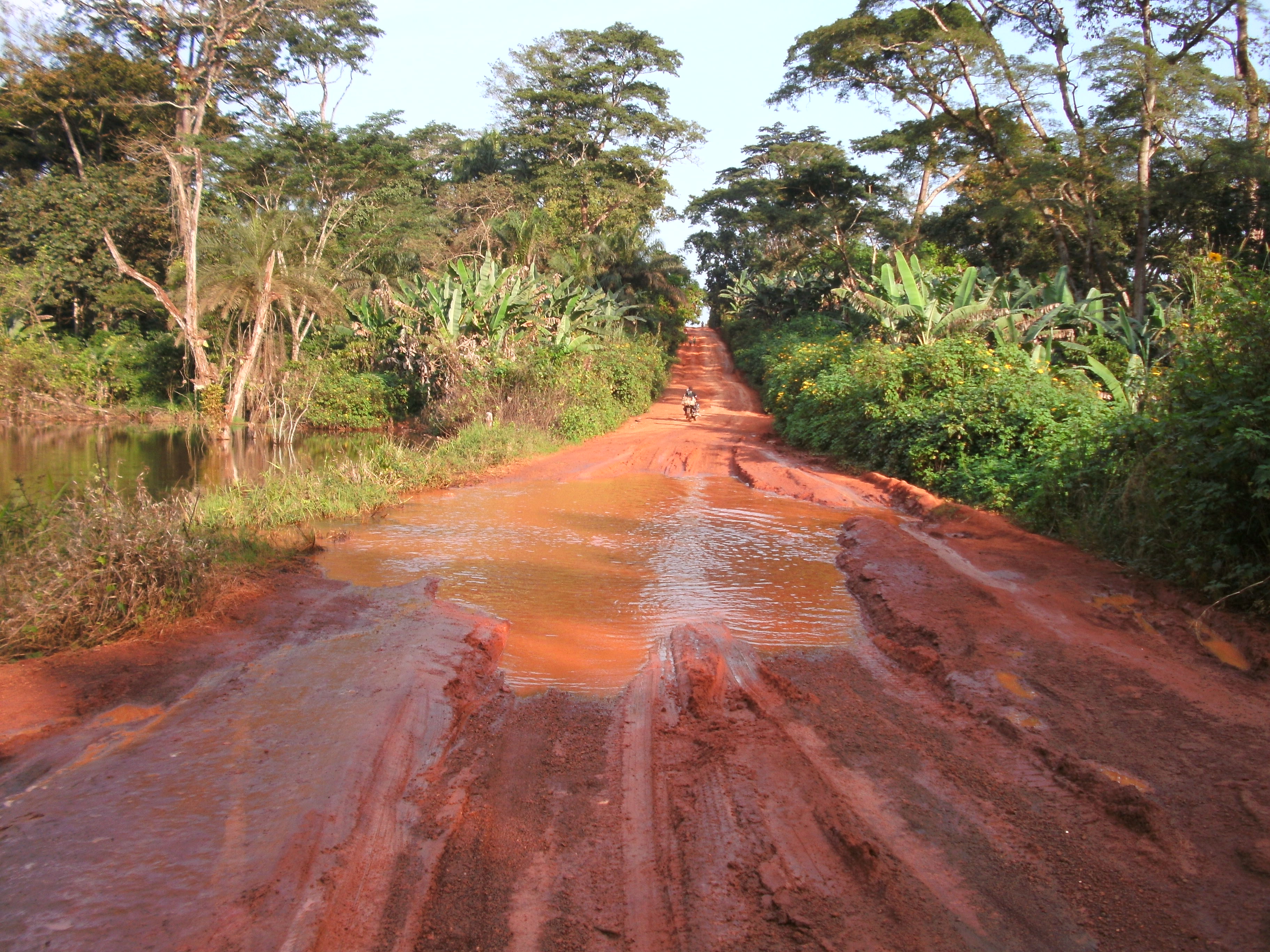 Bourbier sur la piste entre Tibati et Banyo. Après une pluie d'orage, les étangs débordent sur la route et créent des bourbiers, difficiles à traverser. This is an image with the theme "Africa on the Move or Transport" from: Cameroon